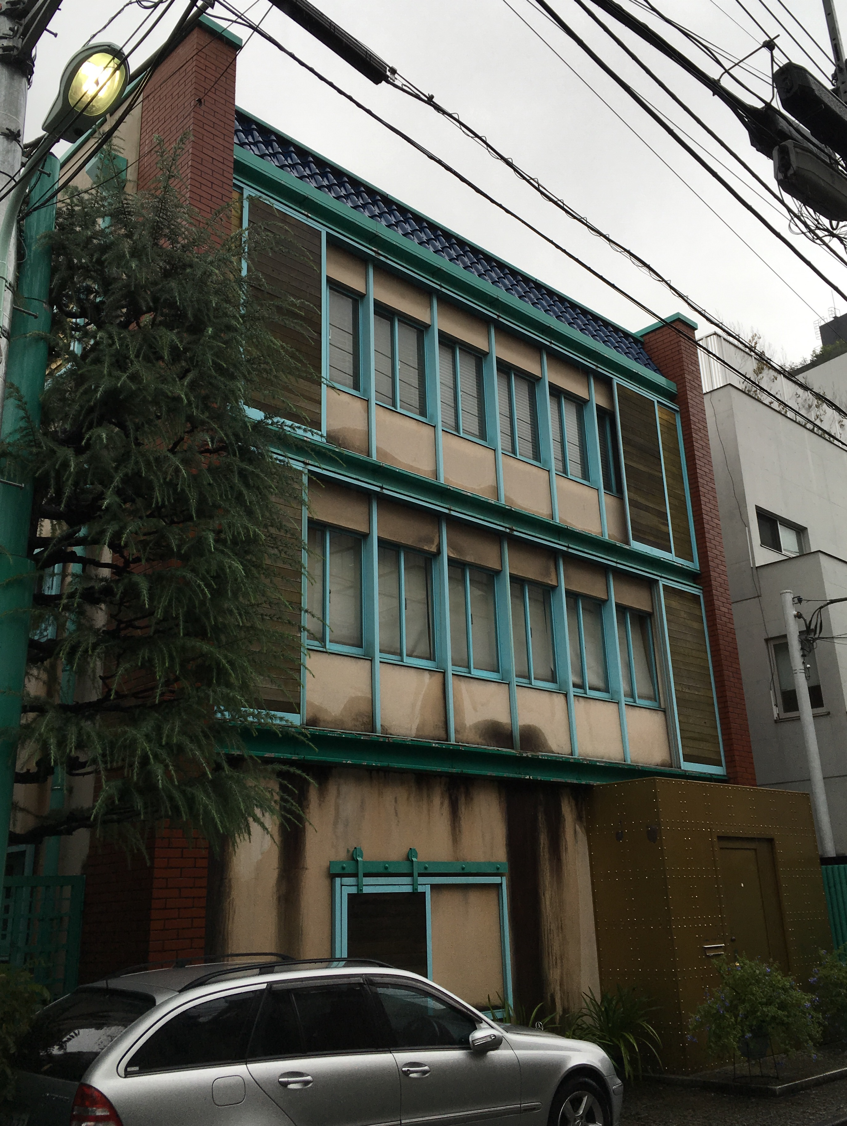 アルド・ロッシの作品（共作）